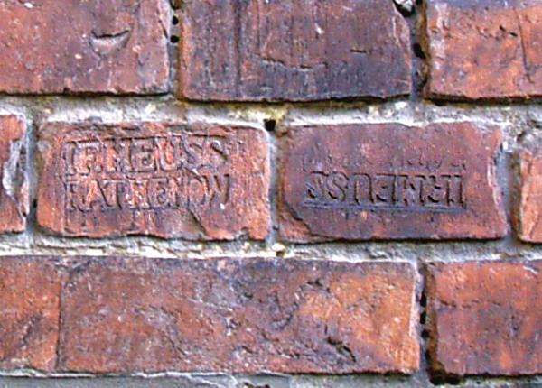 Ziegelstempel der Ziegelei Meuss in Rathenow (Brandenburg).